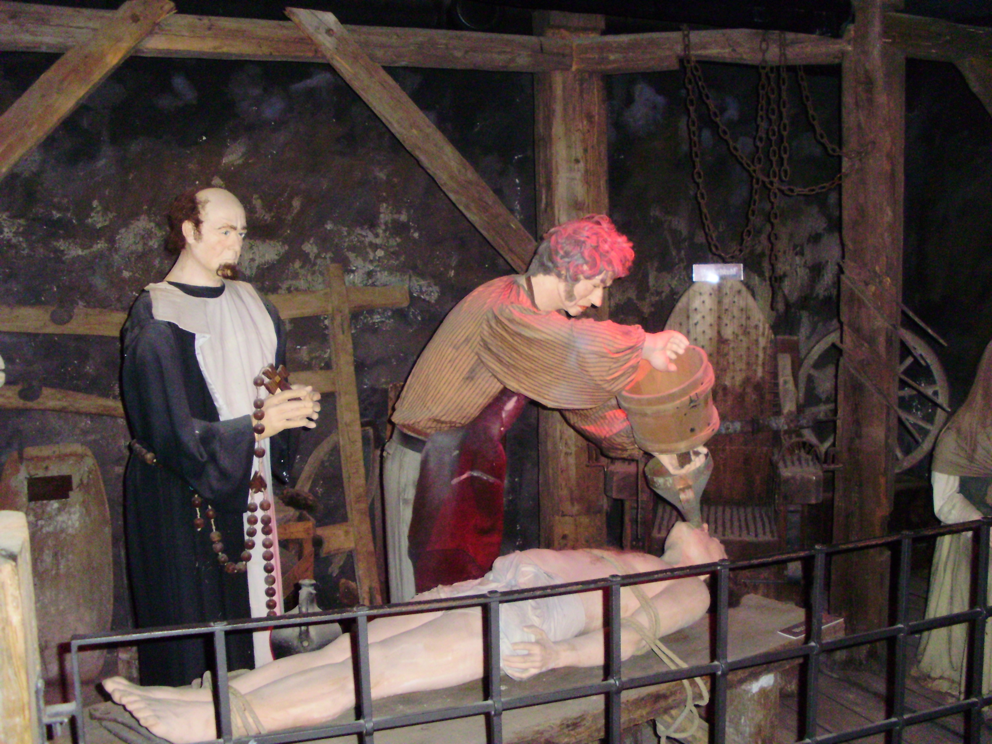 Museum für mittelalterliche Rechtsgeschichte – Wien